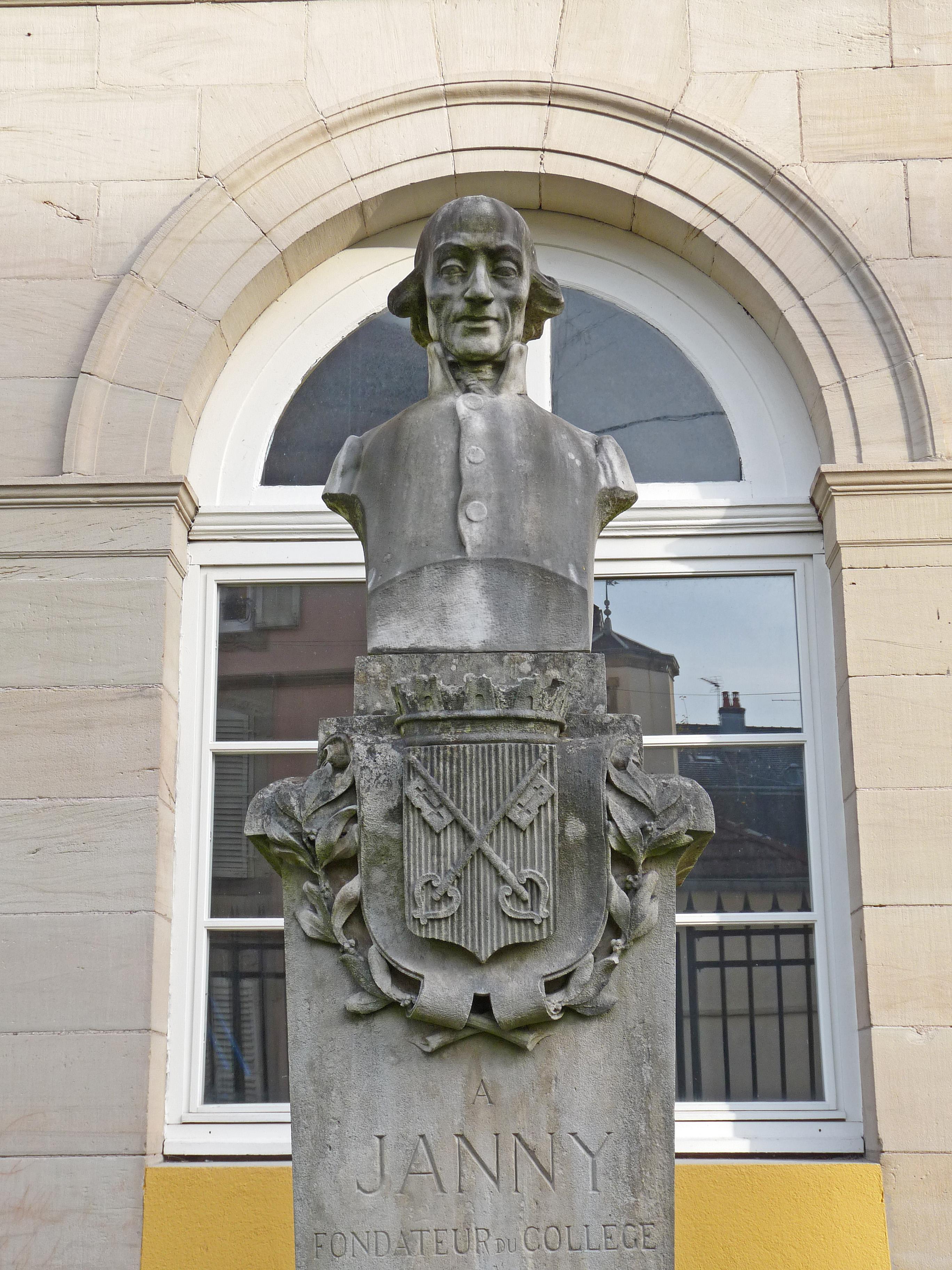 Remiremont : statue de Nicolas Janny (1906)